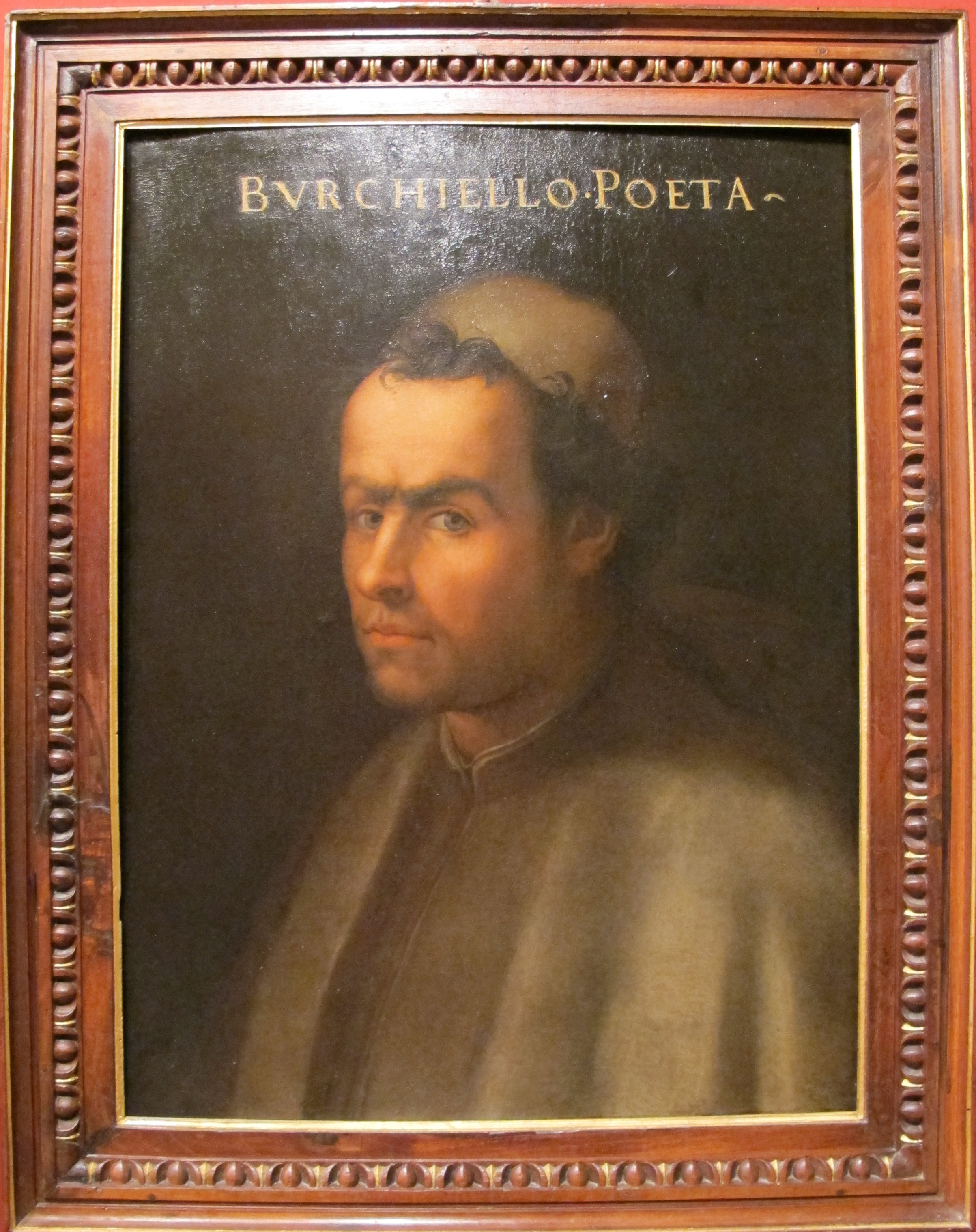 Cristofano dell'altissimo, domenico burchiello, ante 1568